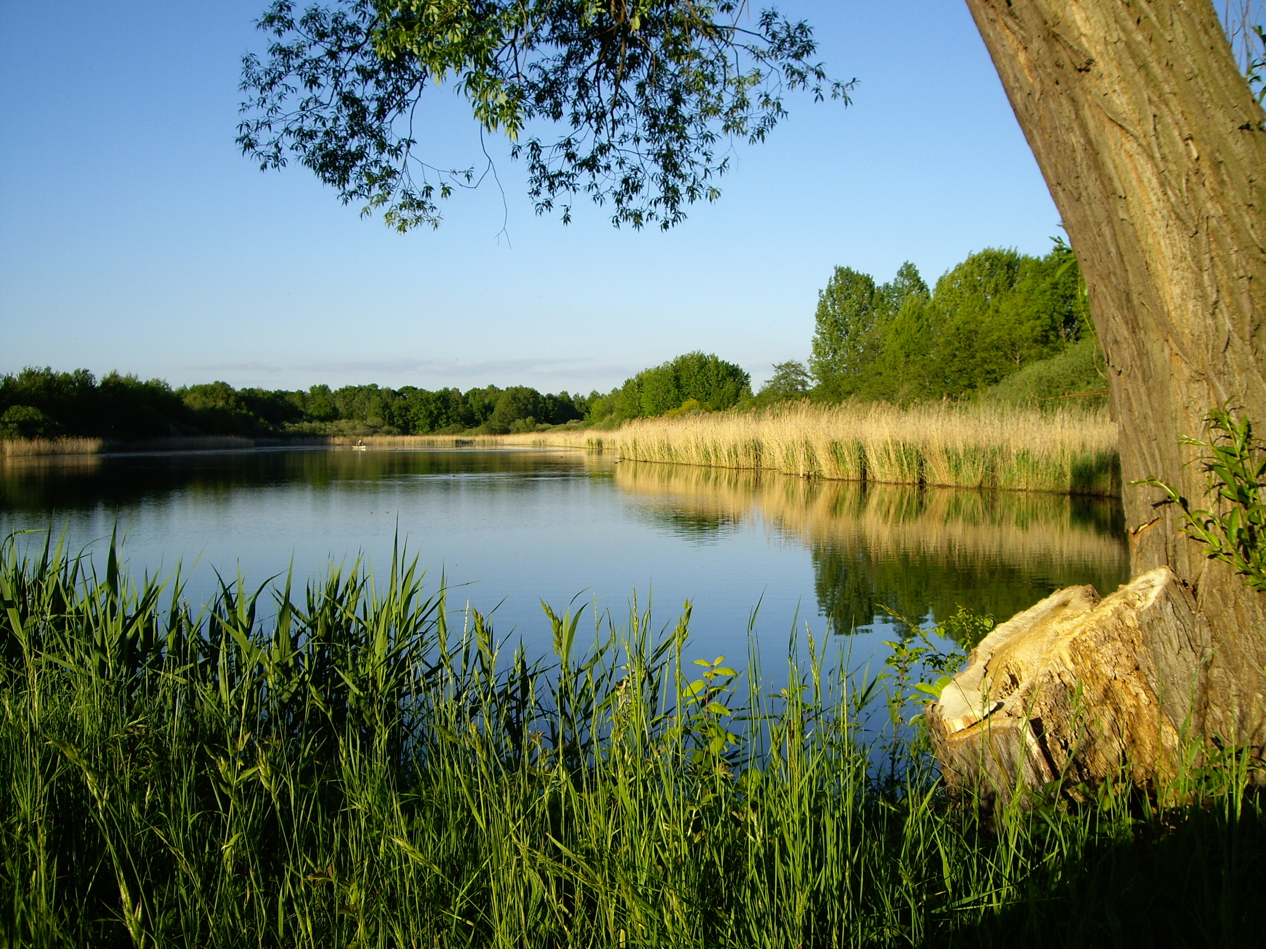 Mittlerer (in Bezug auf Größe und Lage) der Rohrbacher Teiche